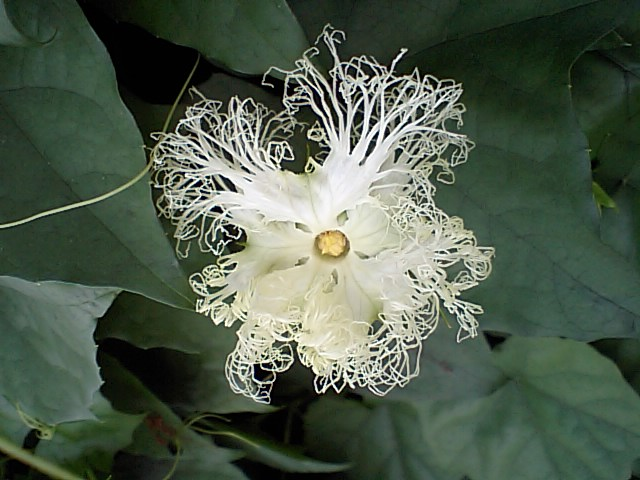 キカラスウリの花